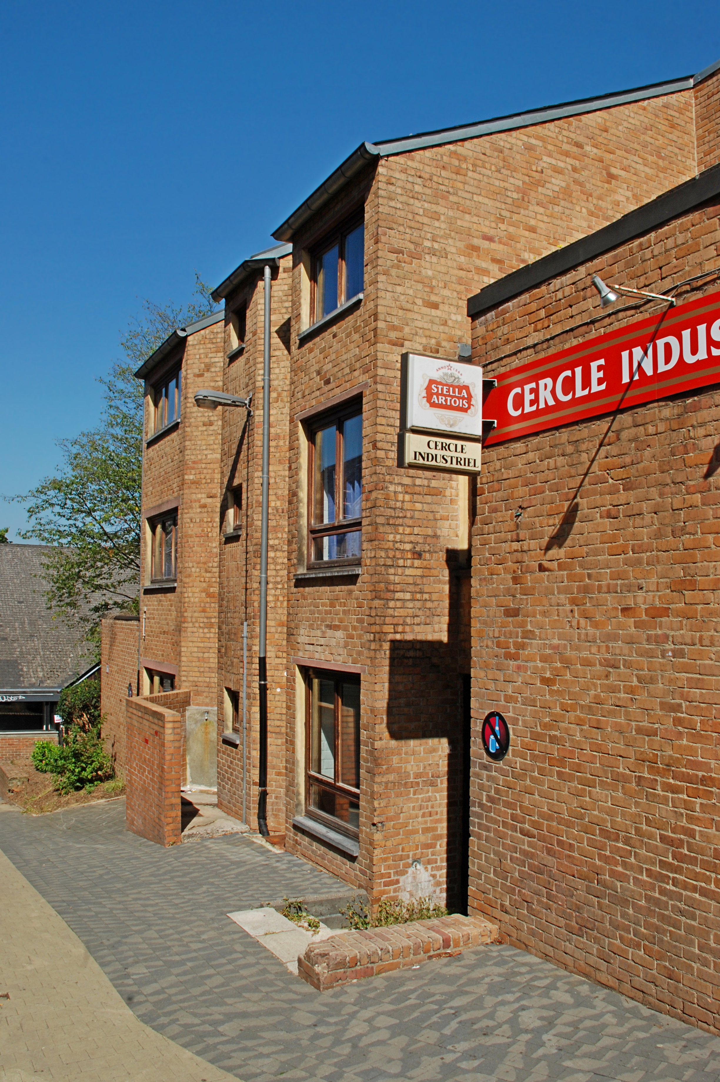 Belgique - Louvain-la-Neuve - Cercle industriel (cercle des étudiants ingénieurs)